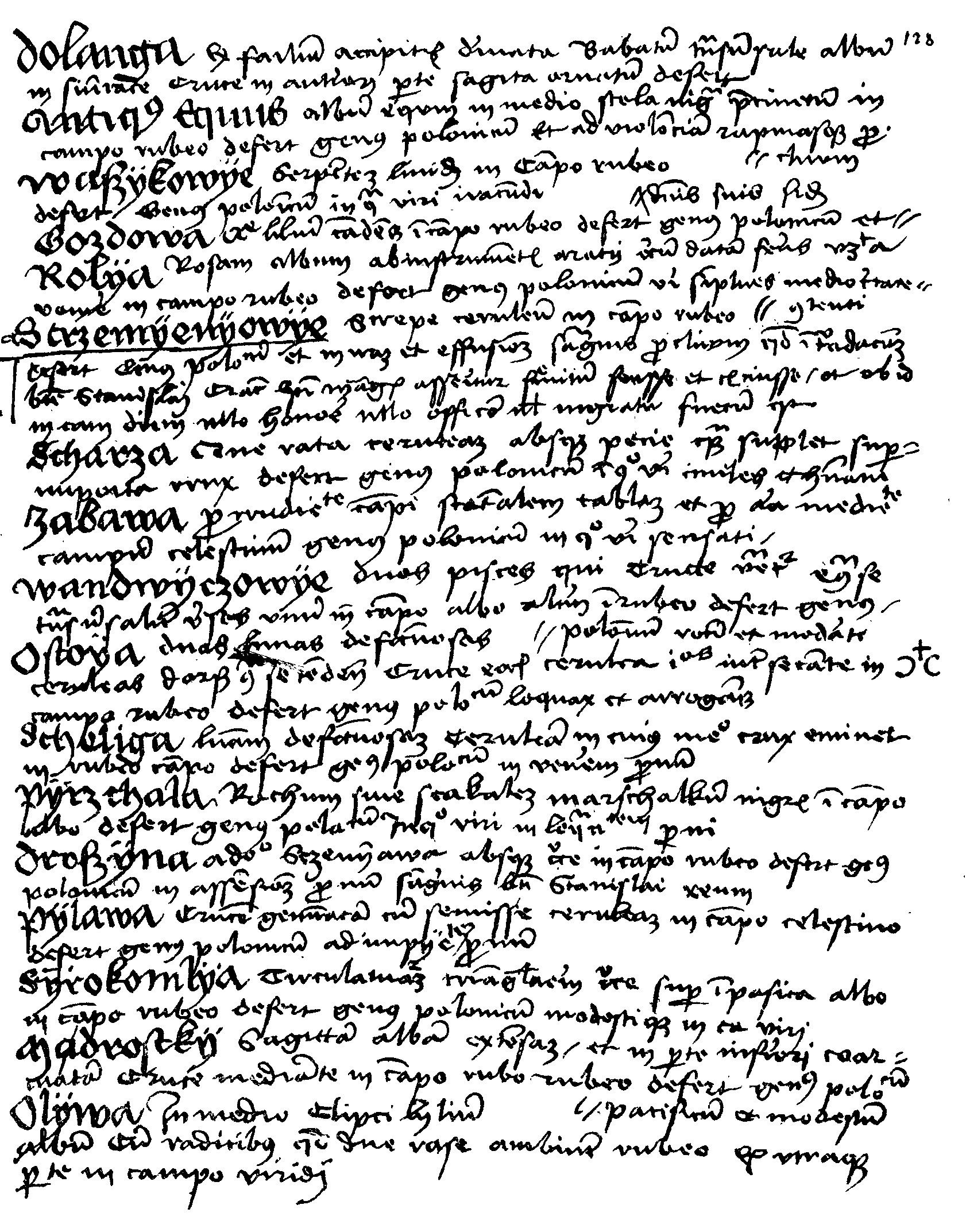 Zygmunt Celichowski,"Insignia seu clenodia regis et regni Poloniae. Z kodeksu kórnickiego", wyd. Z. Celichowski, Poznań 1885.